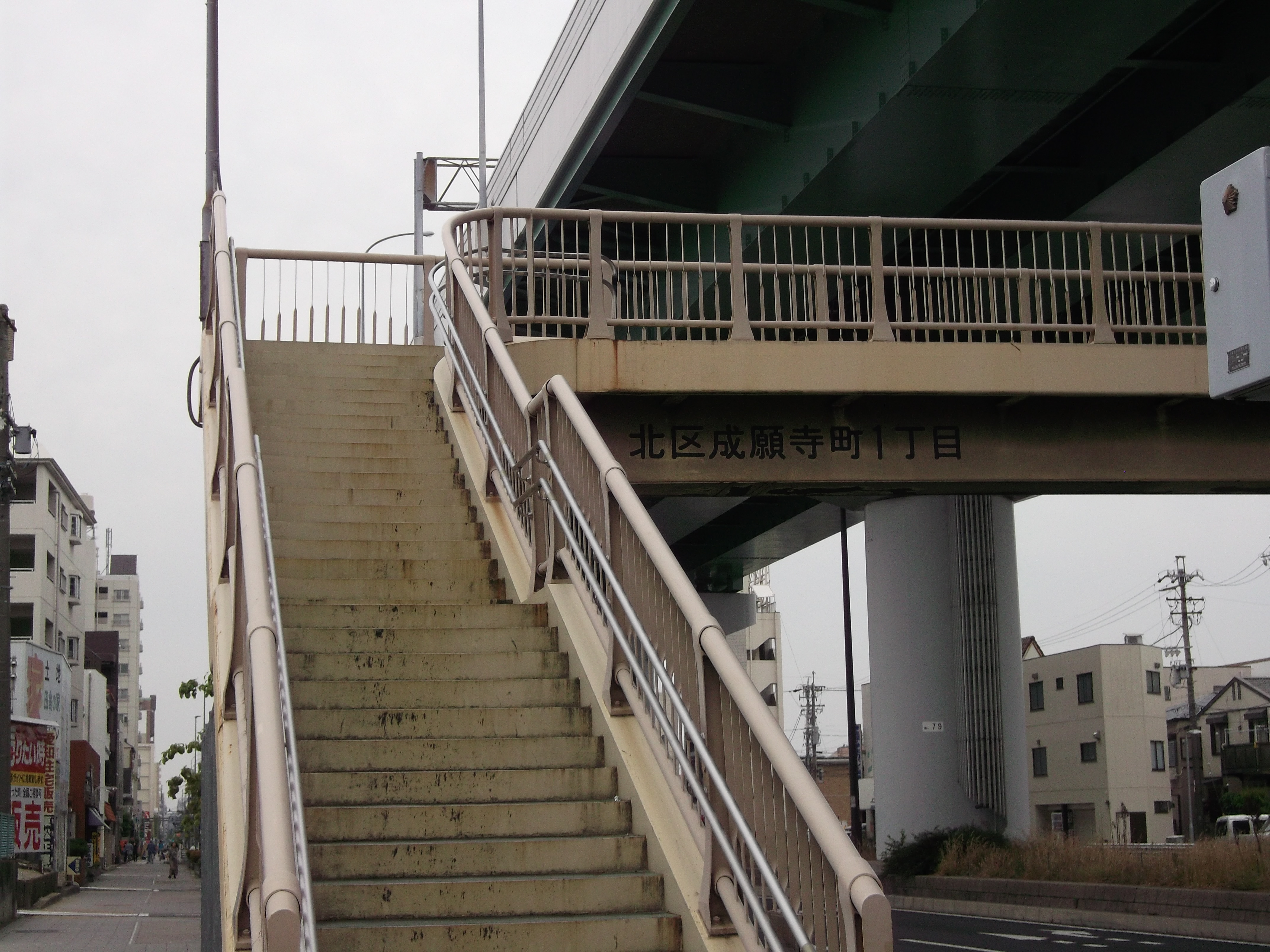 名古屋市北区成願寺一丁目にある「北区成願寺町1丁目」の表示がある歩道橋の写真。